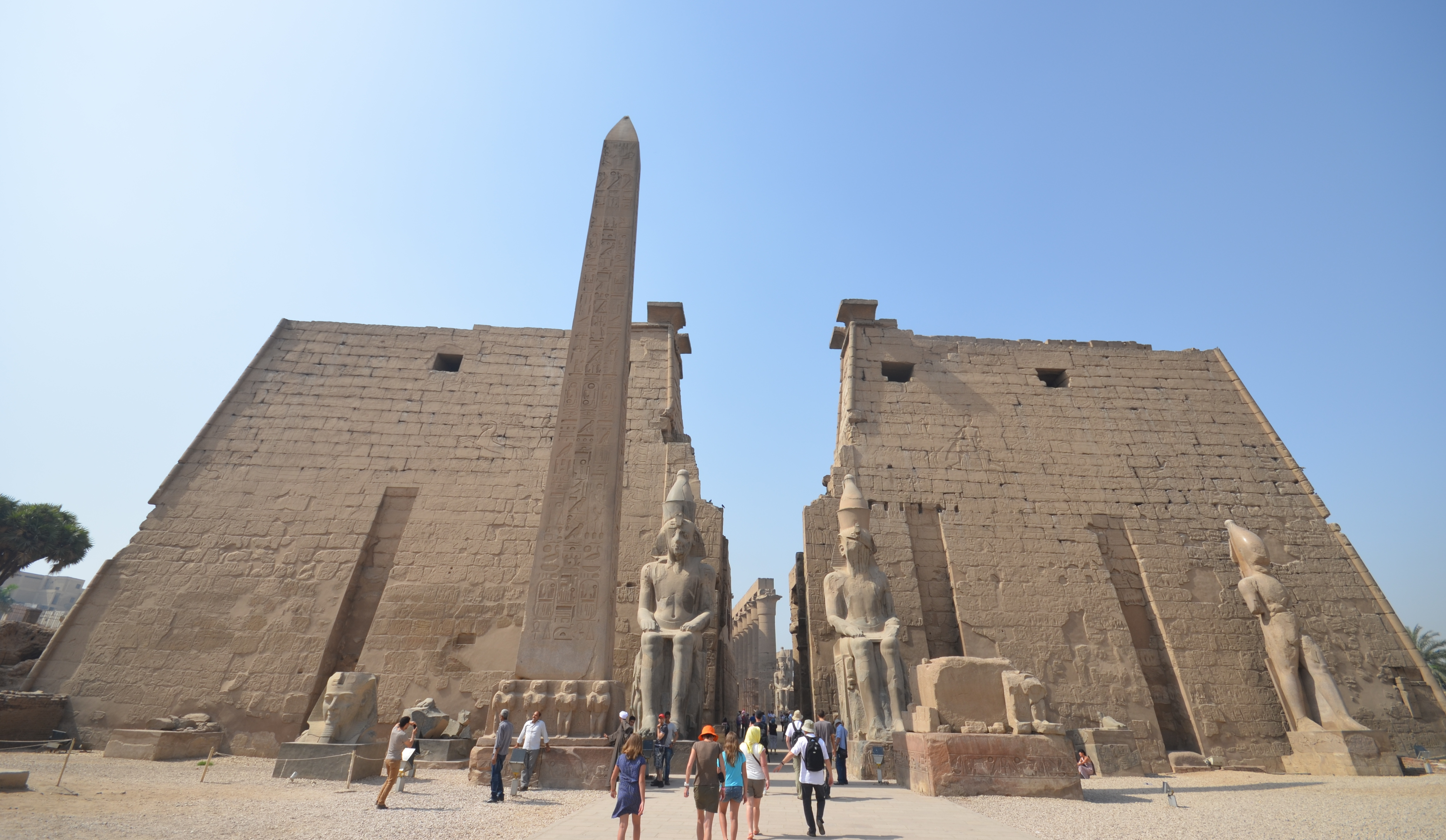 مدخل معبد الأقصر